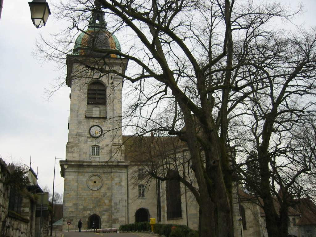 Cathedrale Saint Jean de Besancon - Partie Superieur